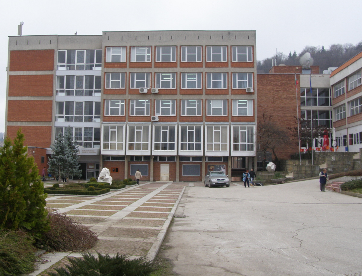 Uniwersytet Wielkotyrnowski im. Świętych Cyryla i Metodego